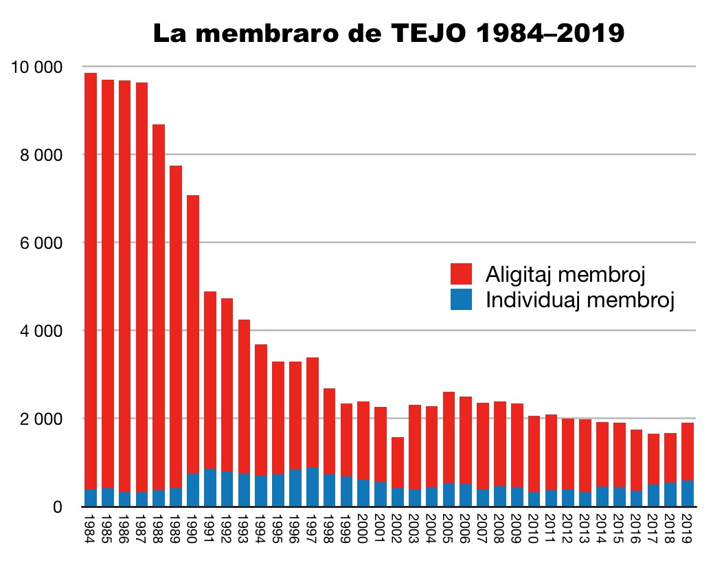 La membraro (individuaj kaj aligitaj) de TEJO 1984-2019